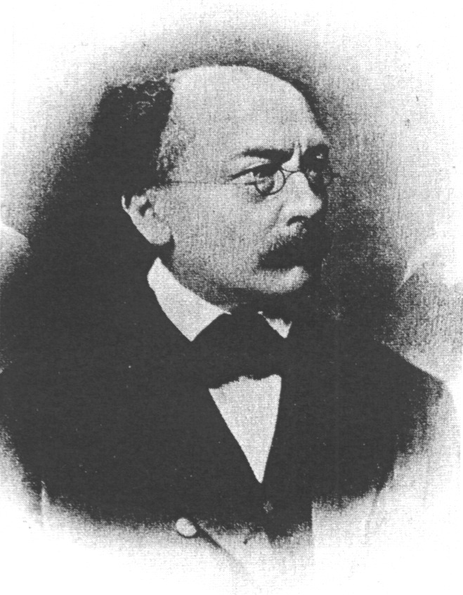 Karl Wilhelm Nitzsch (1818–1880)